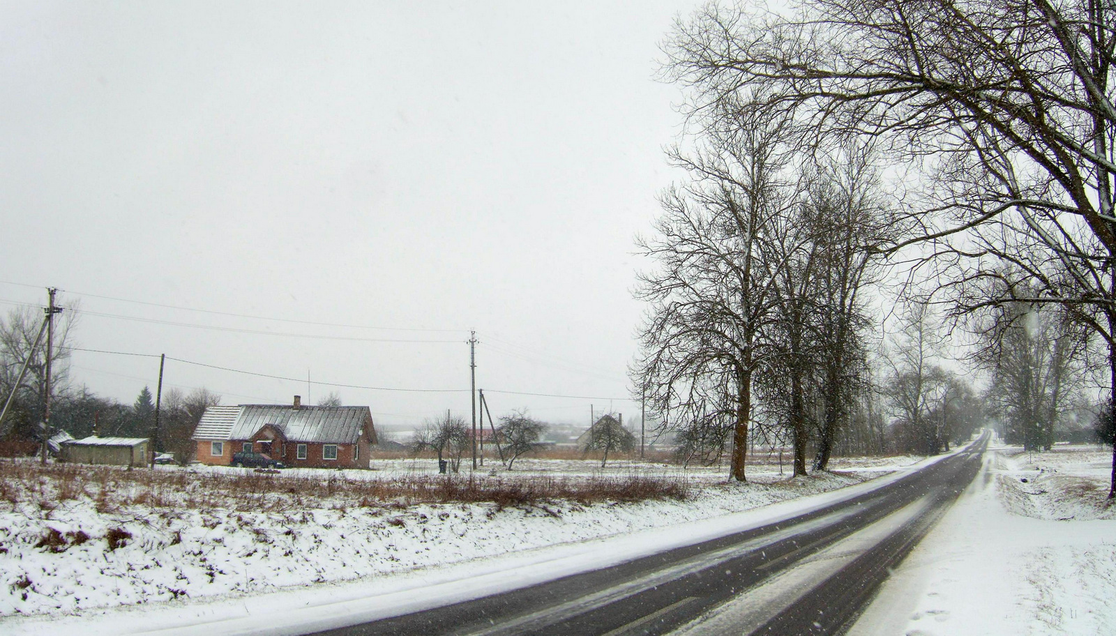 Gaukštonių kaimas